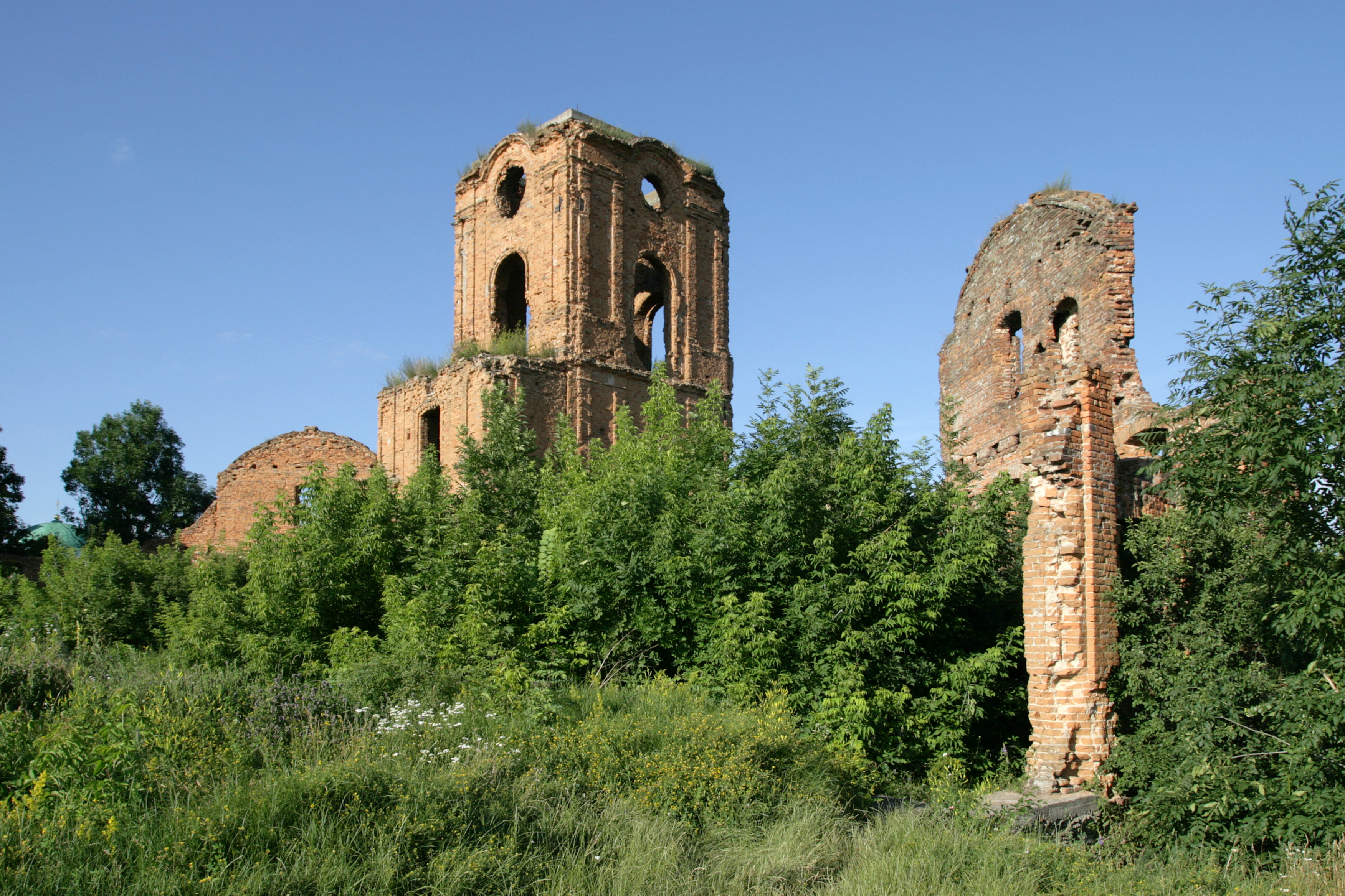 Замок (мур.), Корець, вул.Б.Хмельницького